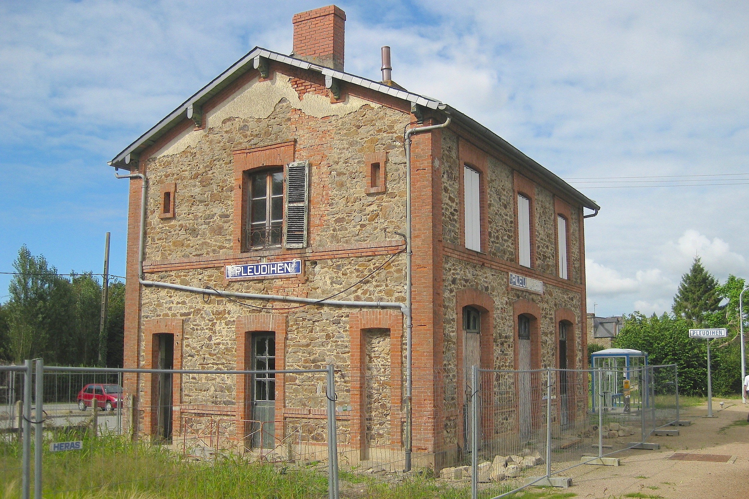 L'ancien bâtiment voyageurs de la gare de Pleudihen, lors de sa réhabilitation en logements sociaux.